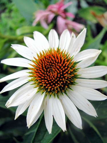 Camomille?